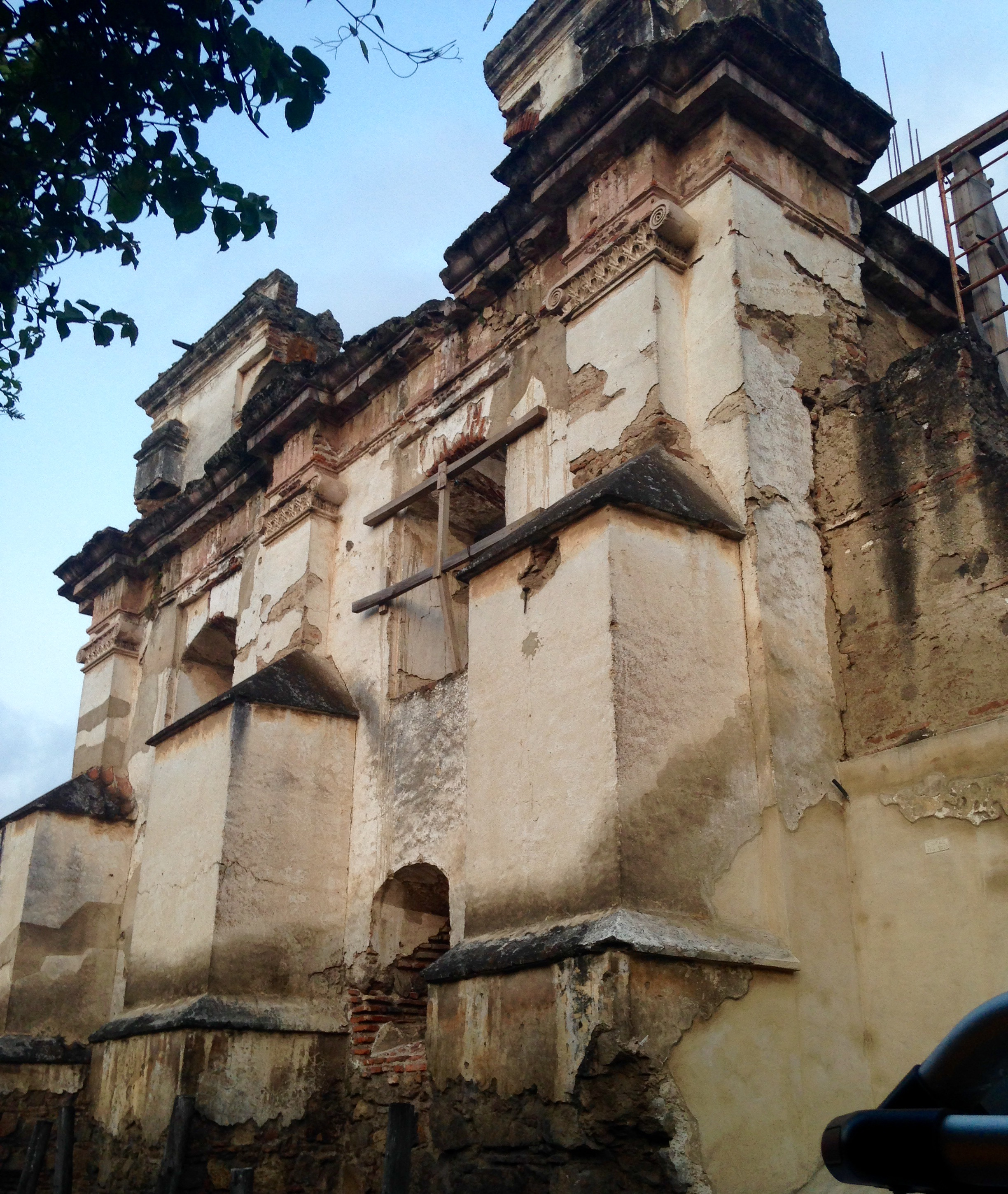 Ruinas de la iglesia de La Concepción en la Antigua Guatemala en diciembre de 2015. Las runas estaban en proceso de estabilización.